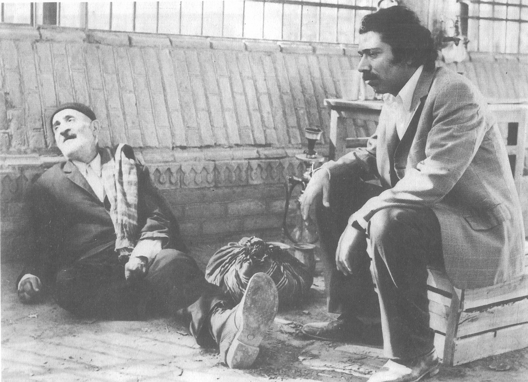 ali nasirian va esmail mohamadi "dayerh mina" (Film), 1973.